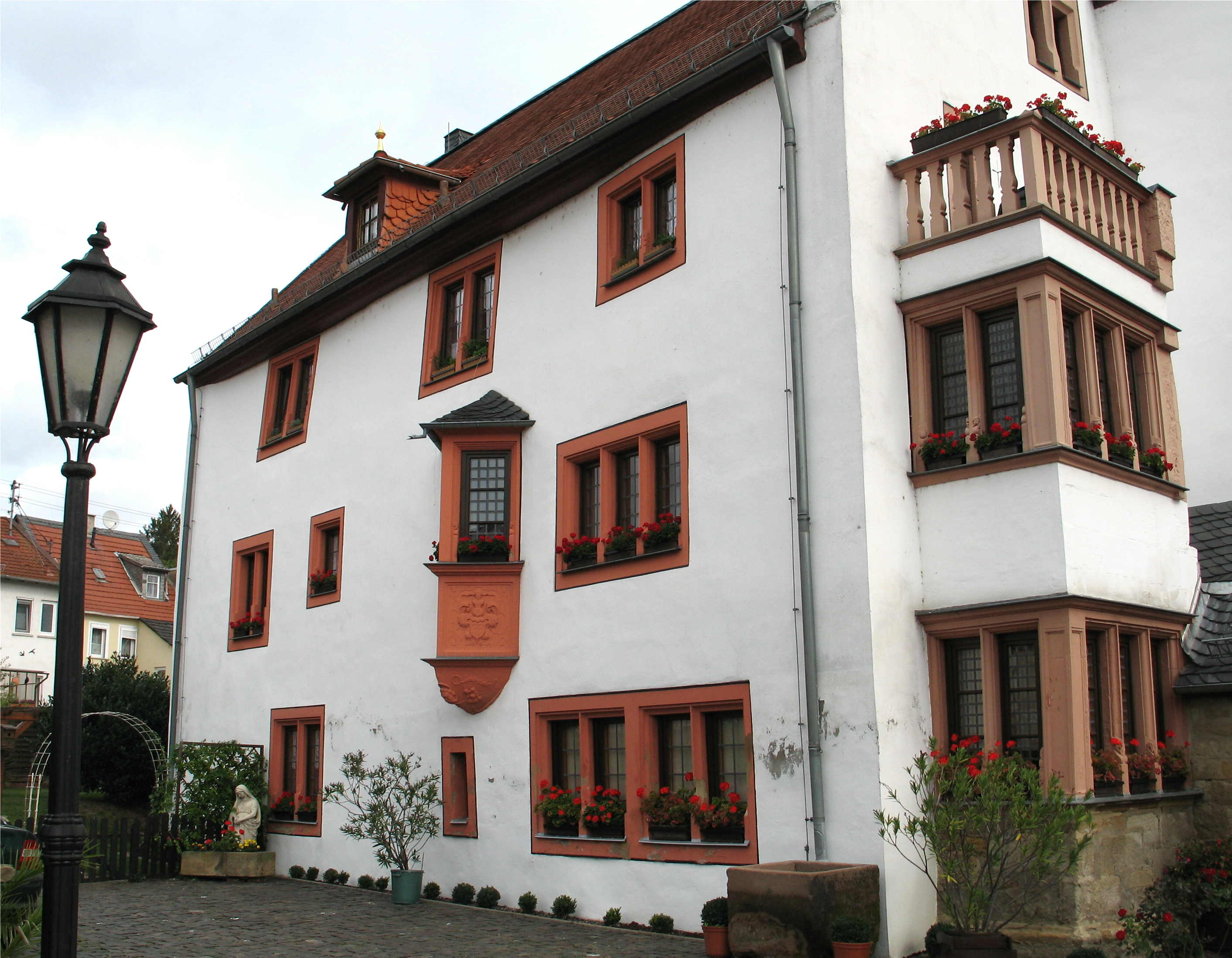 Heimatmuseum zu Bad Sobernheim (Mäerz 2006)